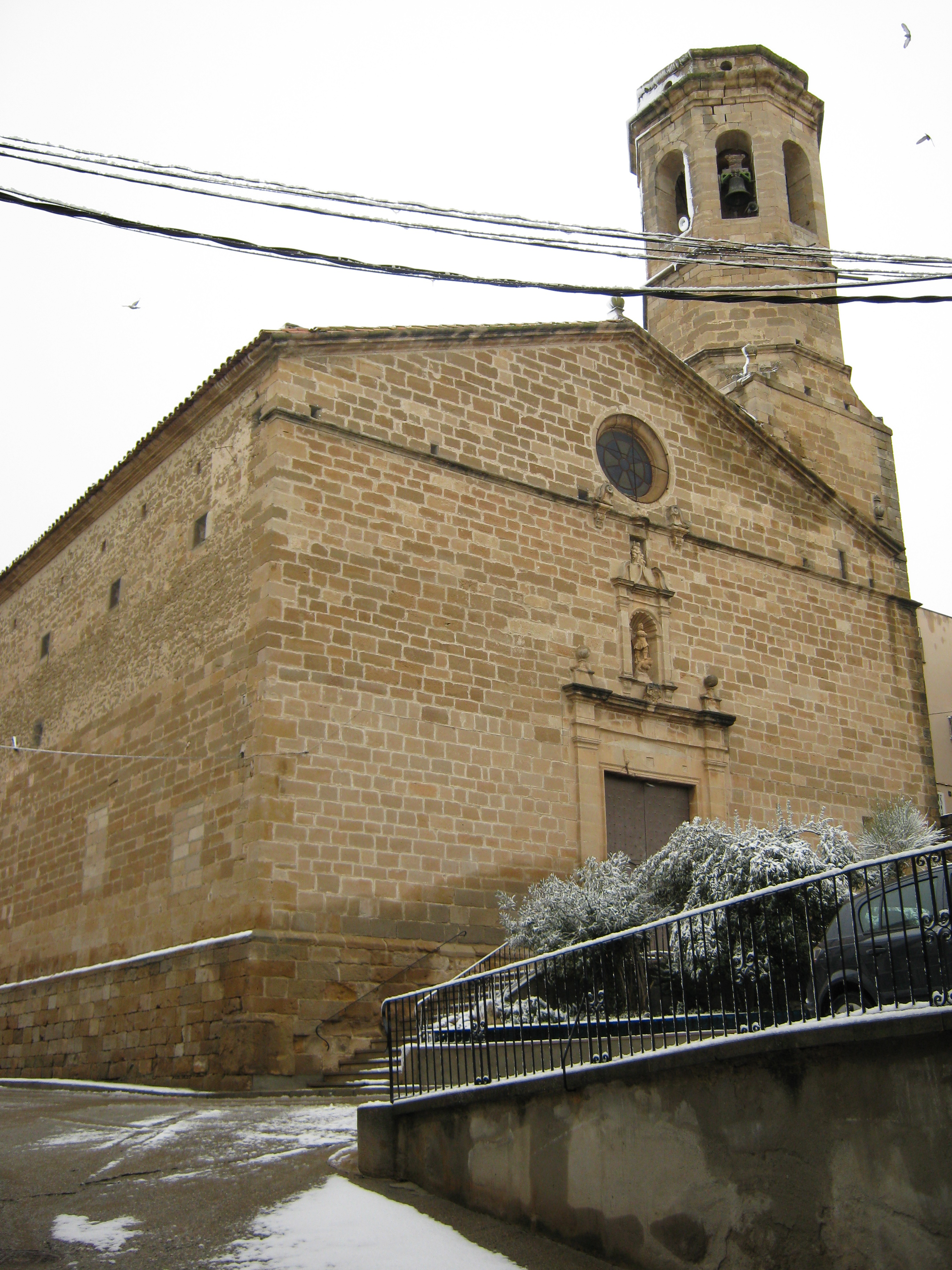 Església parroquial d'Artesa de Lleida